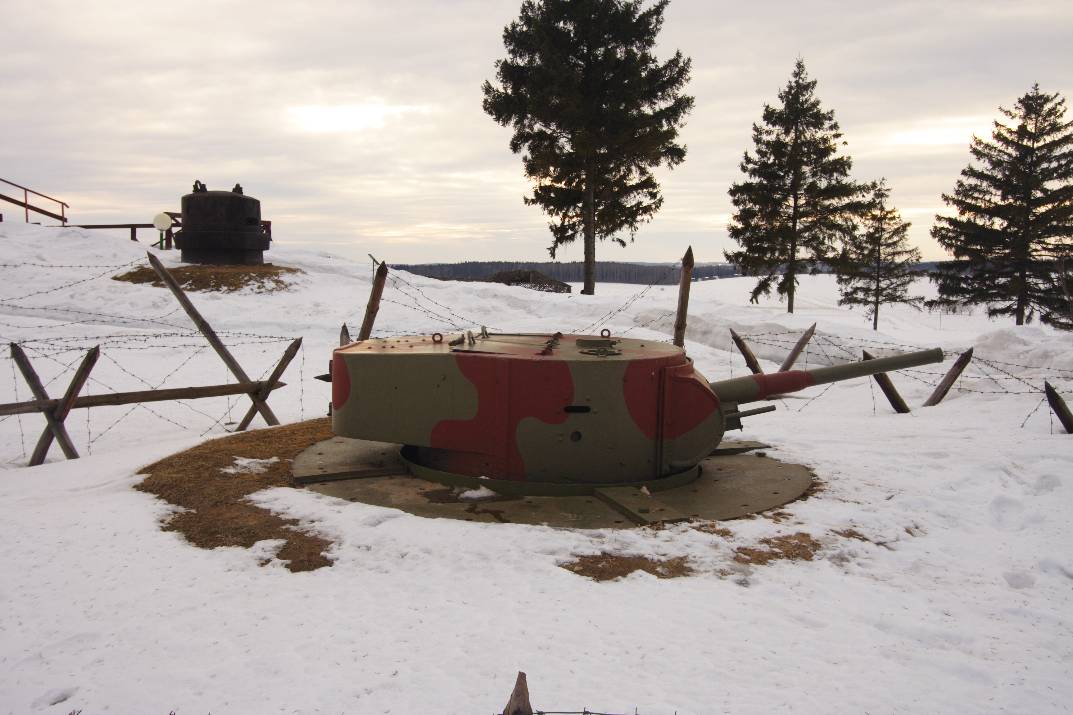 T-26